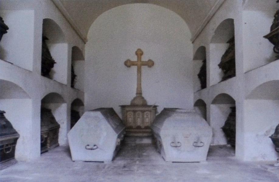 Mausoleum am Büchenberg